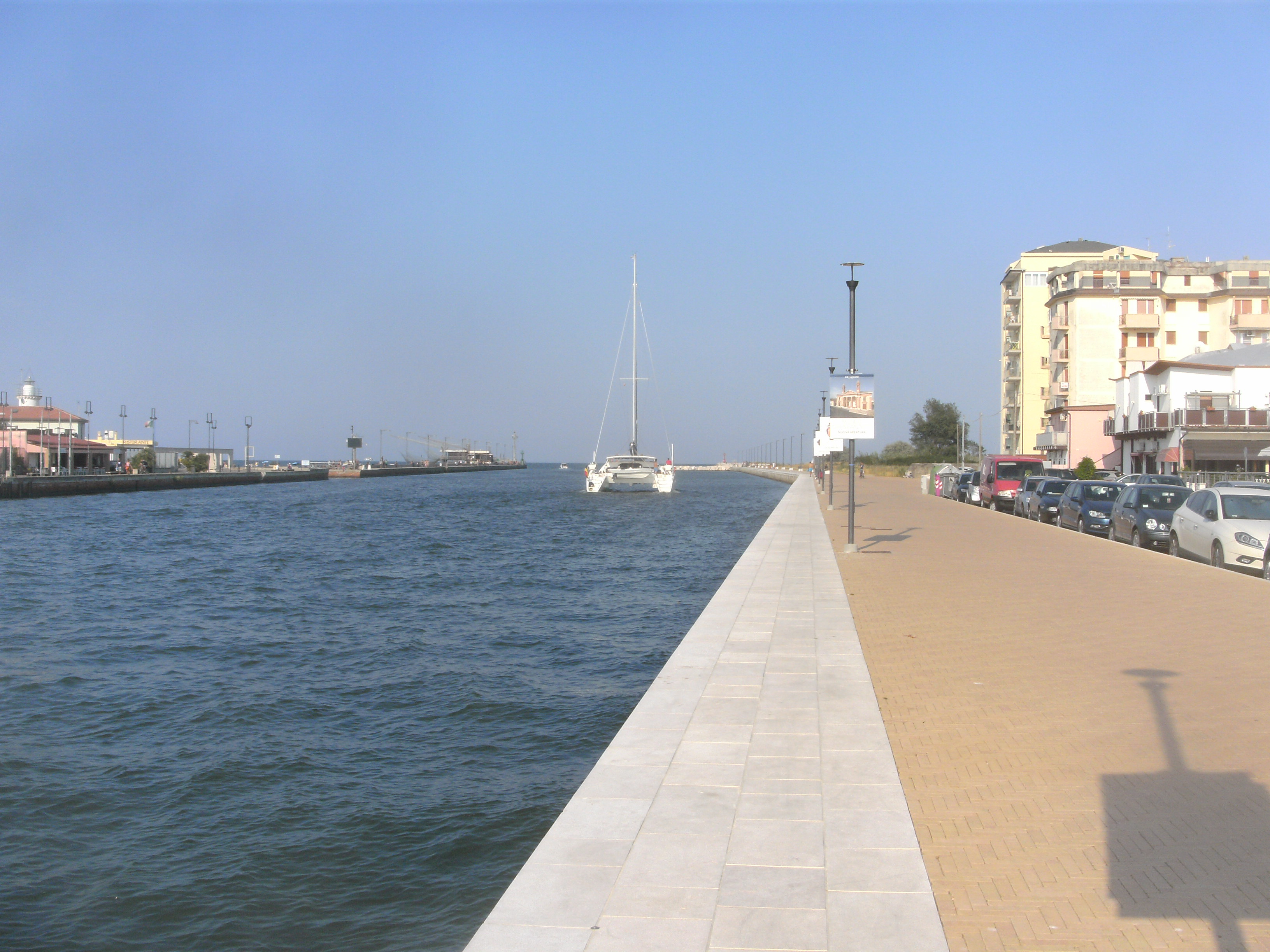 Porto Garibaldi (Comacchio, Fe), Italien, Hafenausfahrt zum Adriatischen Meer über den Kanal Magnavacca